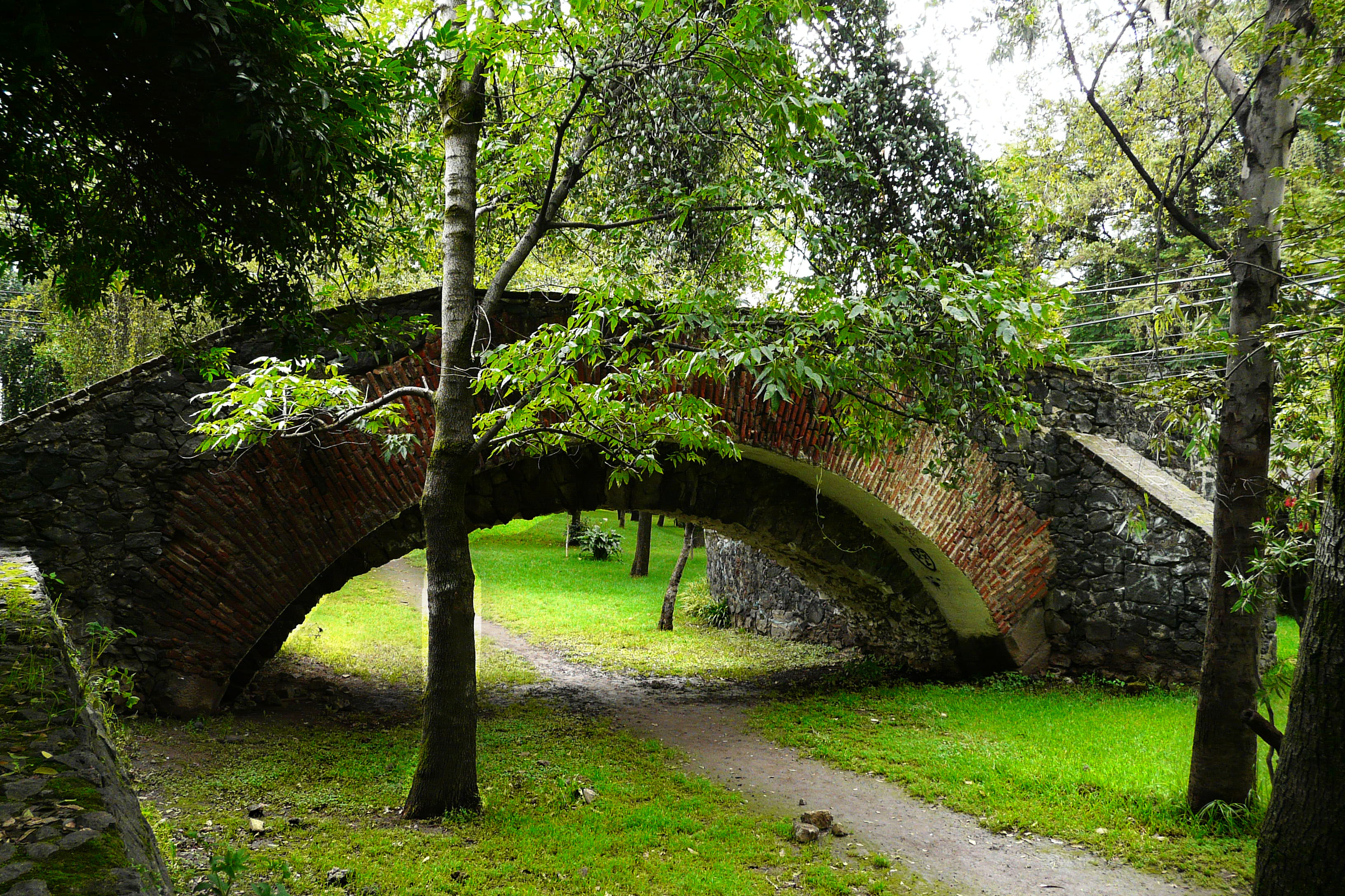 Puente de la Mampostería, Río Chico, Chimalistac. México.D.F.